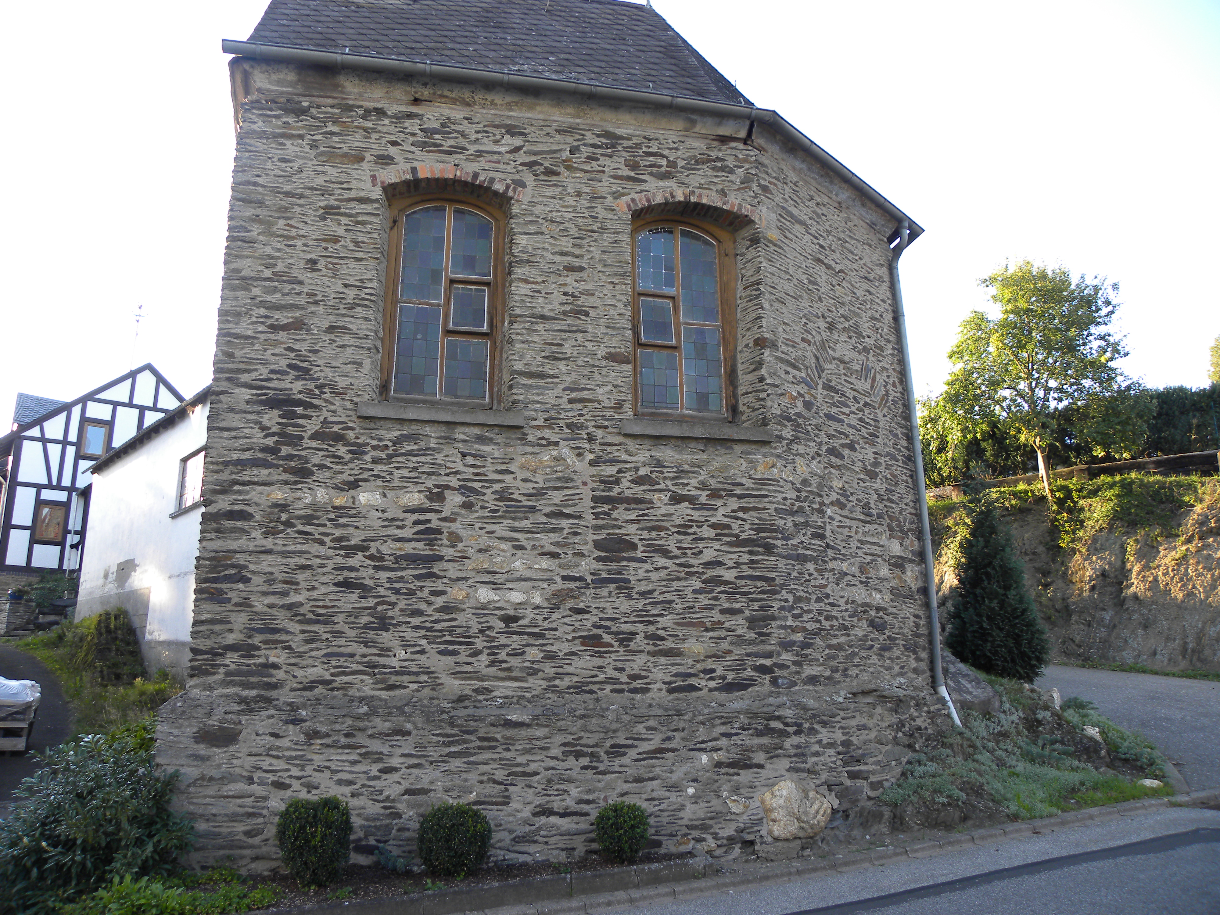 Belgweiler, St.-Anna-Kapelle, 2011, Foto: A. d´Orfey, Kunst im Licht, München, 2011